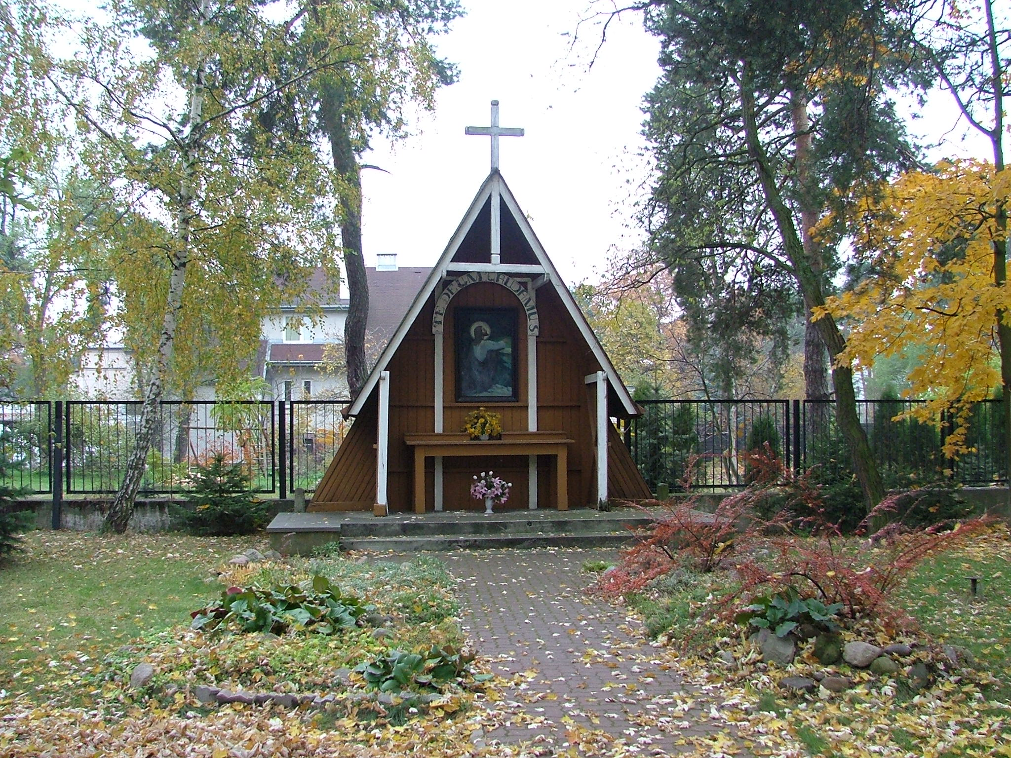 PL, Warsaw, Poland, Radość